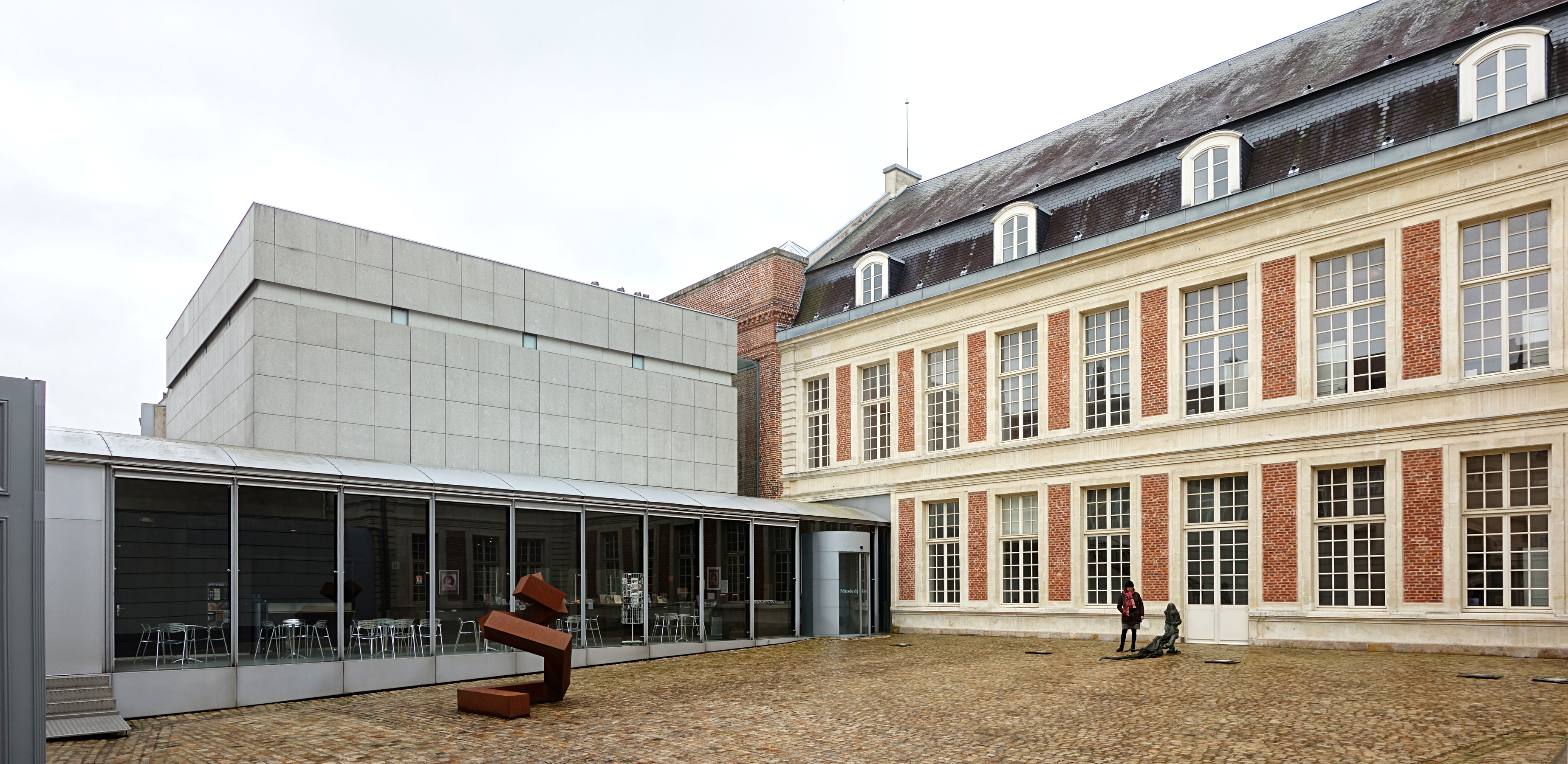 L'entrée du musée de Cambrai.